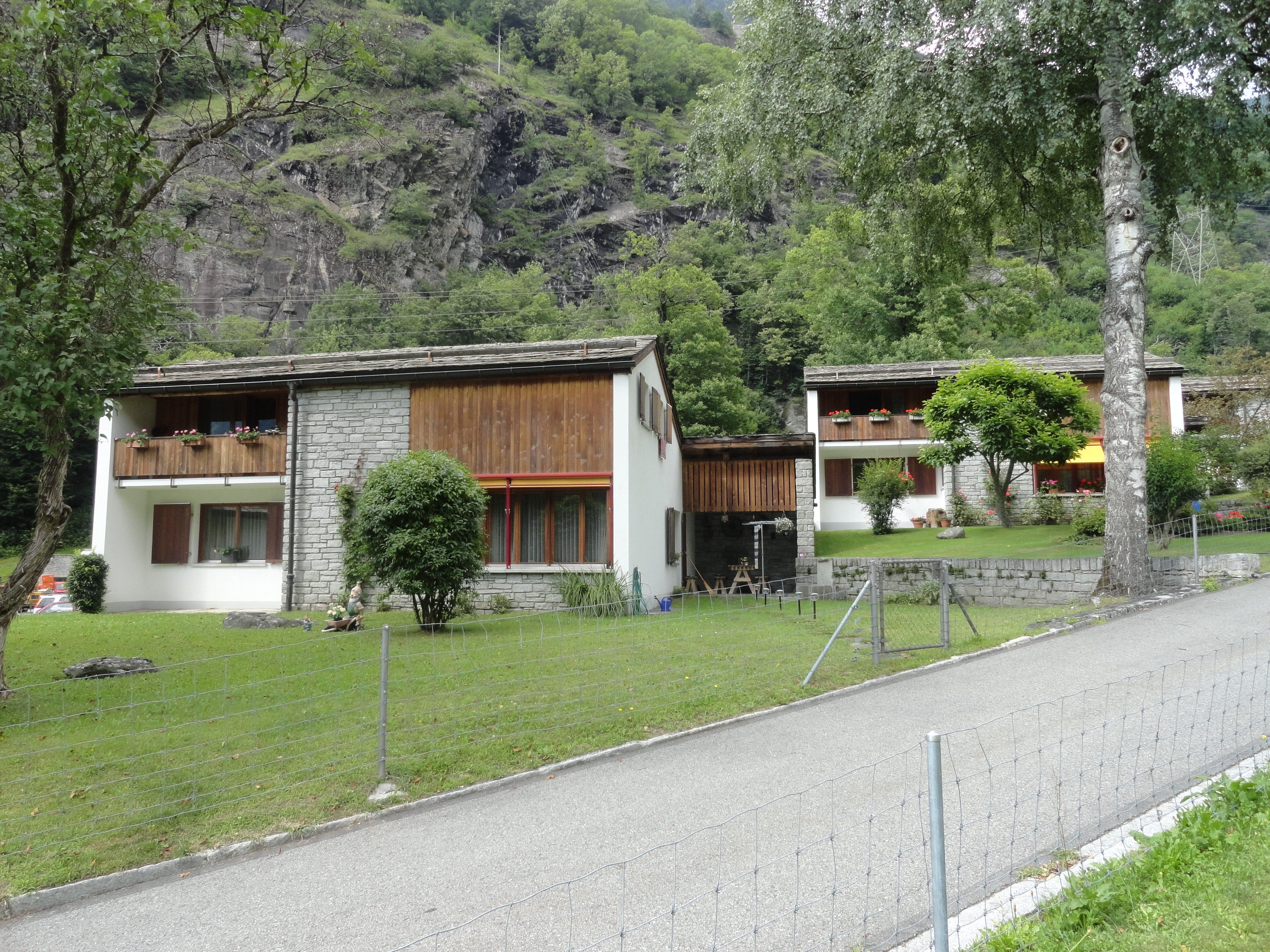 Castasegna: Angestelltensiedlung der Bergeller Kraftwerke, entworfen von Bruno Giacometti